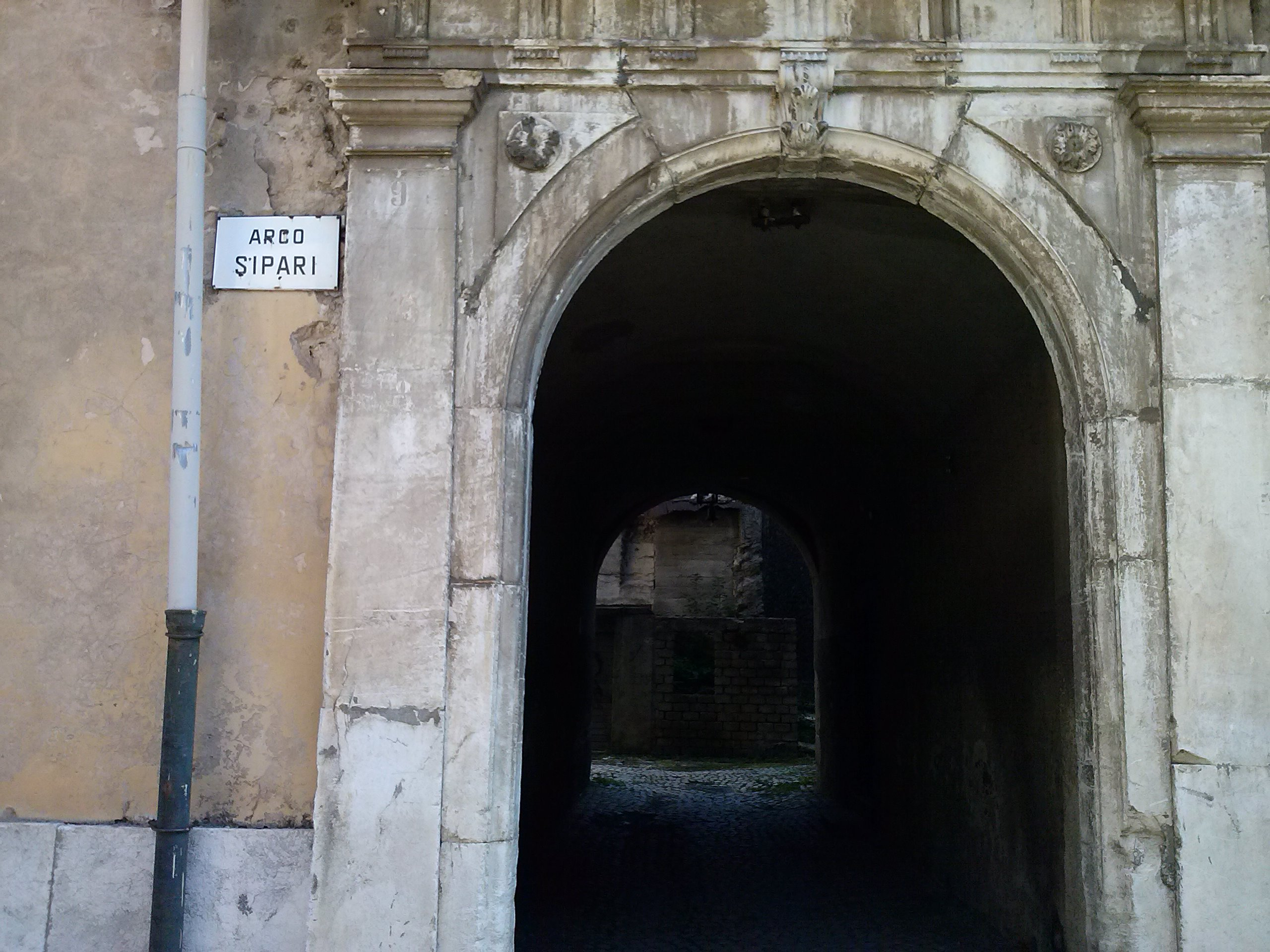 Arco Sipari